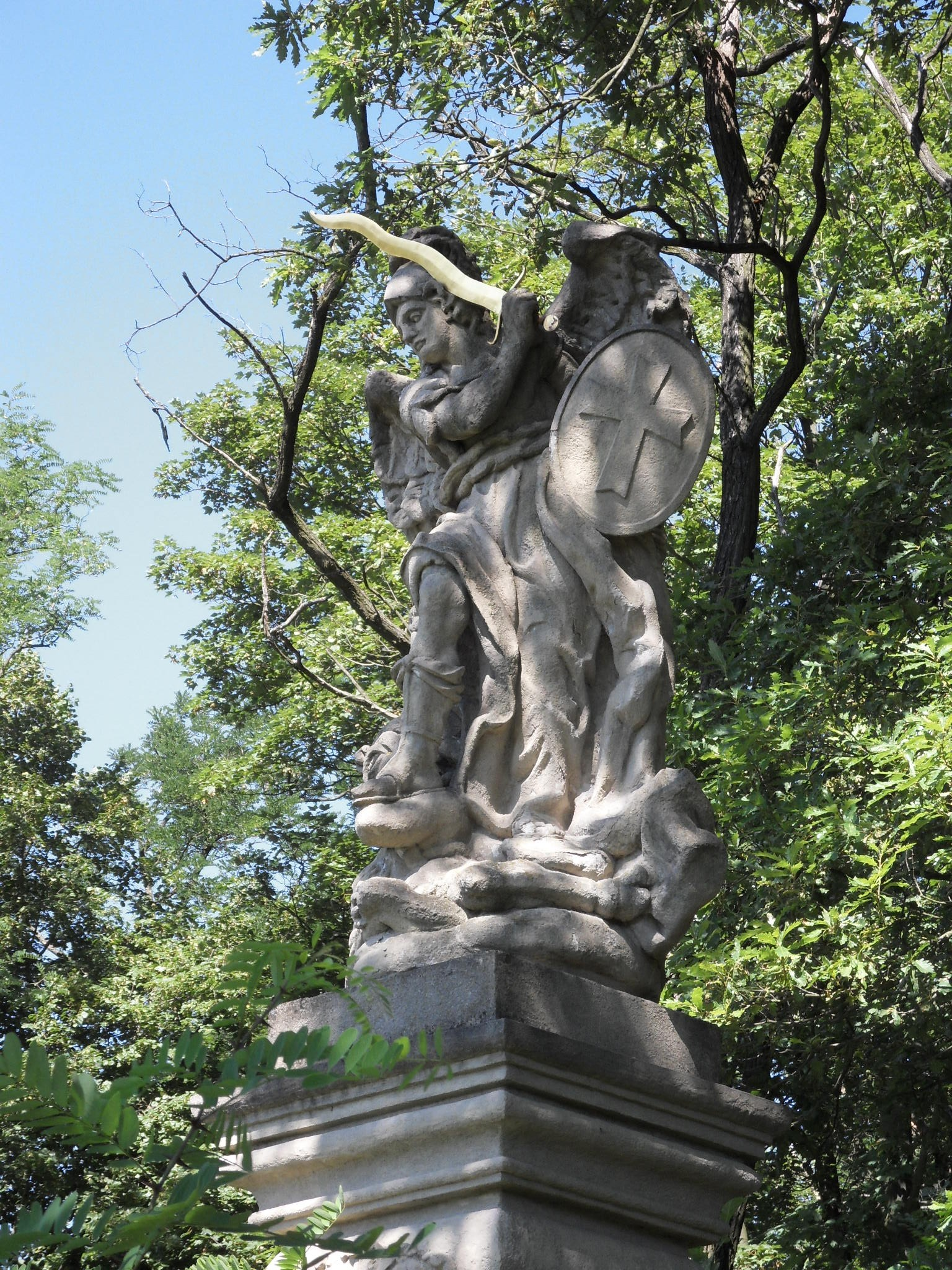 Socha Archanděla Michaela, úpatí návrší Ukřižování, obec Bohušov u Spáleného Poříčí, okr.Plzeň-jih